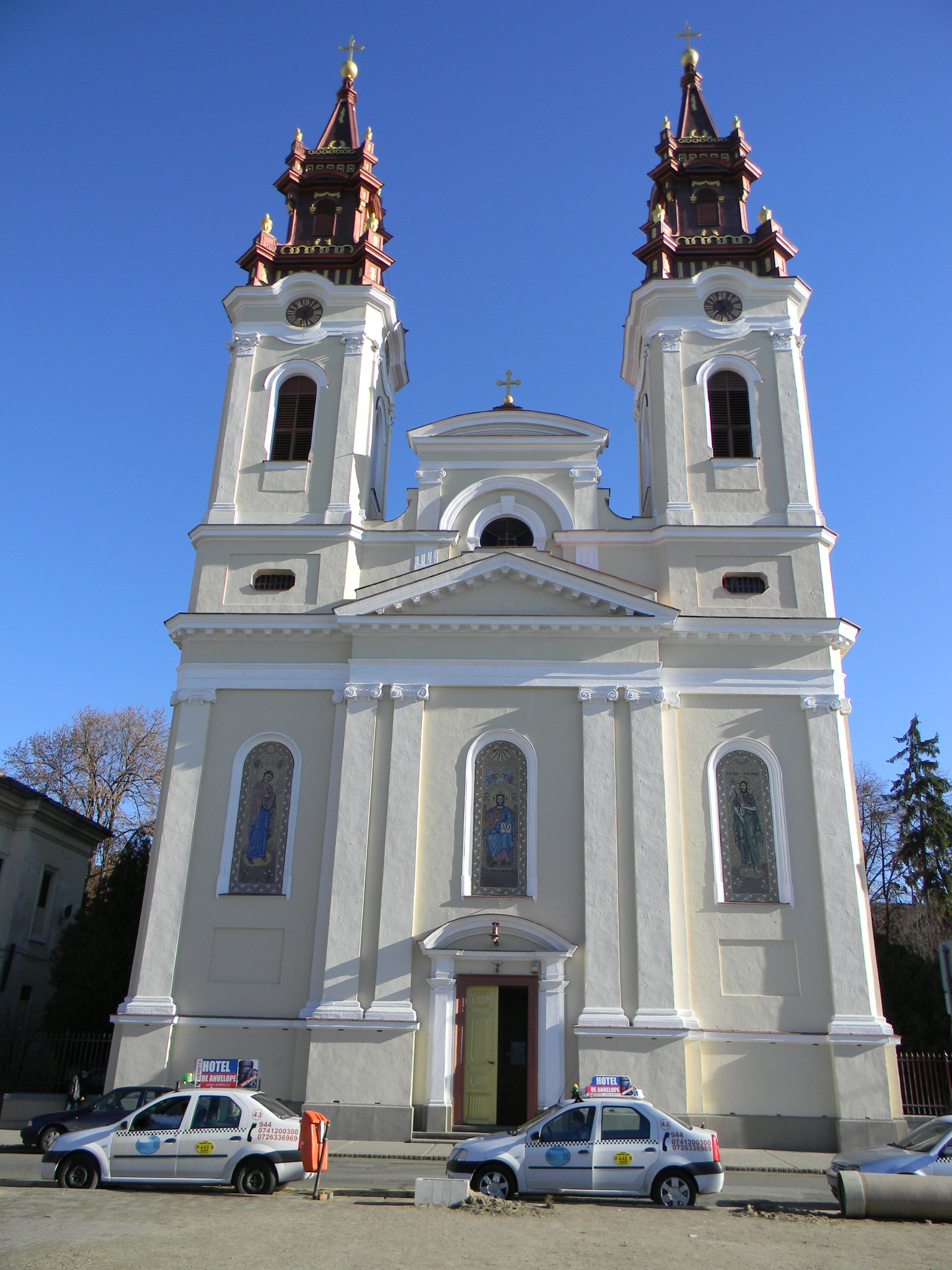 Catedrala Nasterea Sf Ioan Botezatorul Arad